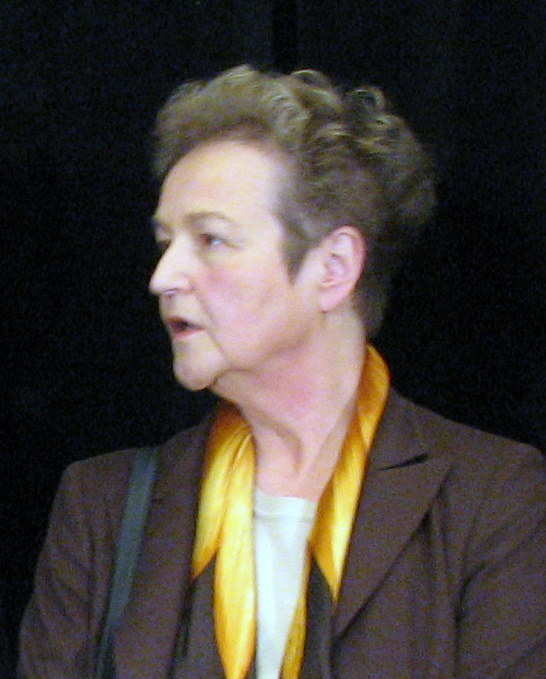 Diskussionsrunde mit Herta Däubler-Gmelin im Hotel „The Ritz-Carlton“ Berlin, 13.02.2008